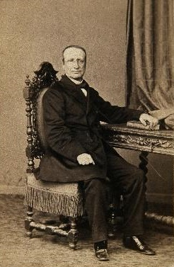 Juan Manuel Montalbán, catedrático de la Universidad Central, fotografía de J. Laurent. Museo de Historia de Madrid